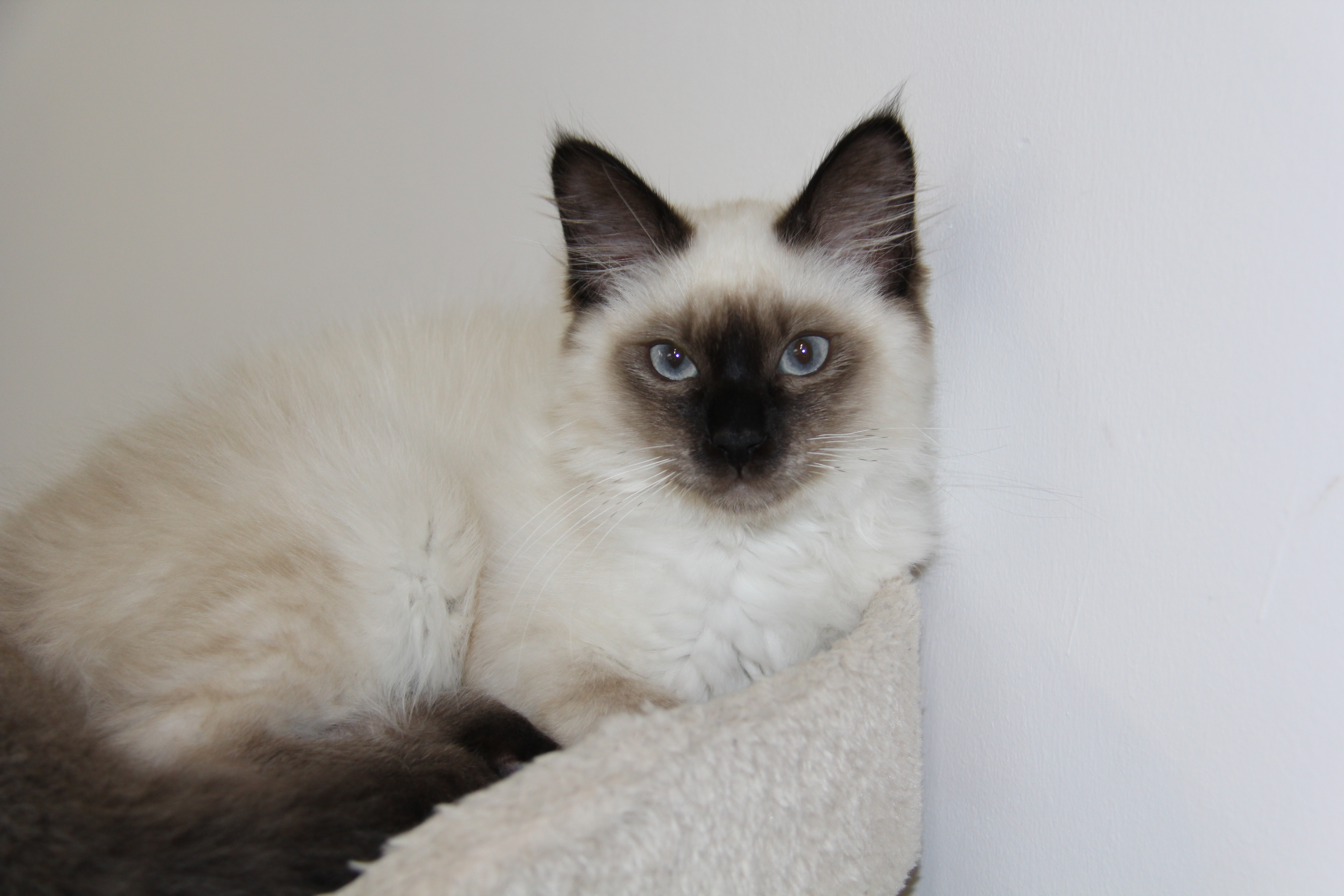 חתול הימלאיה גזעי בצבעי Color Point & Blue Point כפי שצולם על ידי אלעד פרץ.